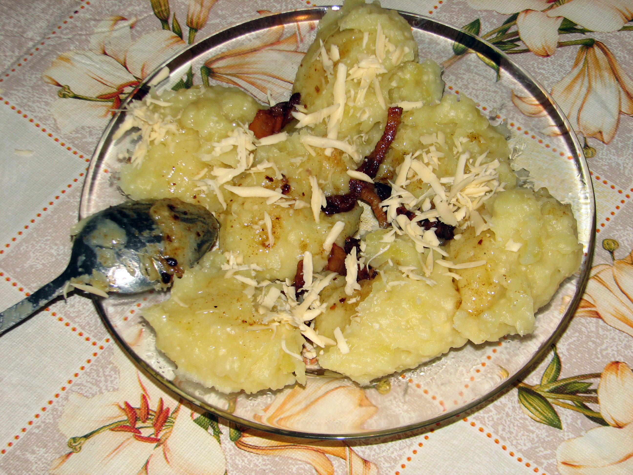 Беларуская (тарашкевіца): Шкубанкі з сырам і шкваркамі